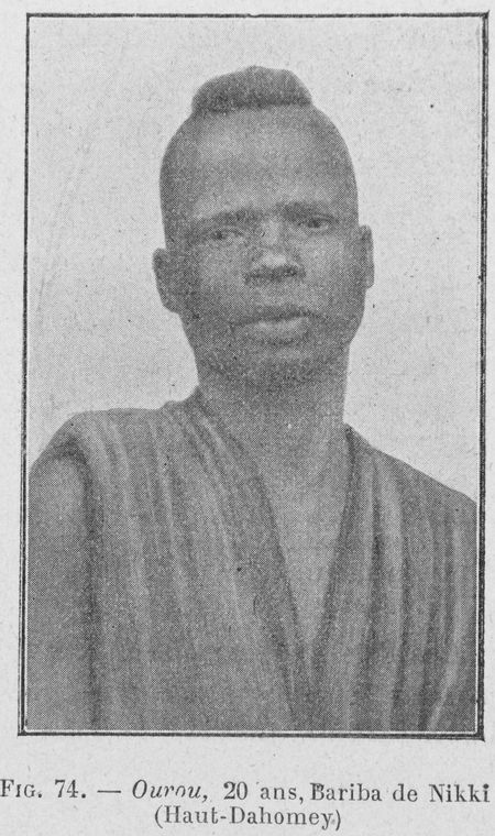 Ourou, 20 ans. Bariba de Nikki (Haut-Dahomey)